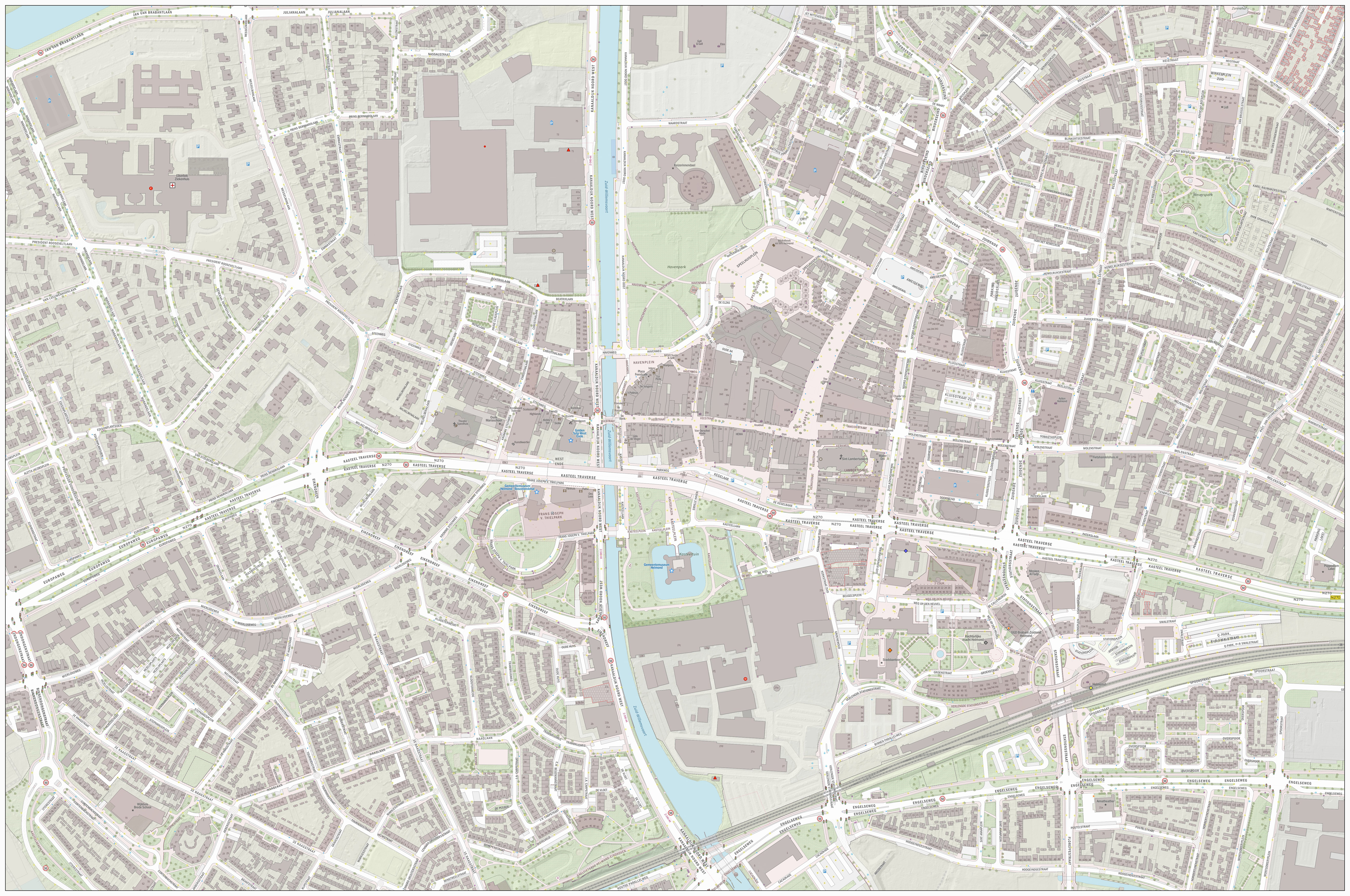 Topografische kaart van Helmond (centrum van woonplaats). Resolutie: 2688 pixels/km. Kaartbeeld samengesteld uit de open geodata van de Basisregistratie Grootschalige Topografie (BGT), Creative Commons-BY Kadaster, en Top10NL en Top25namen (Basisregistratie Topografie, Kadaster), Creative Commons-BY Kadaster. Gebouwvlakken uit open geodata BAG extract, Creative Commons-BY Kadaster. Wegen uit de OpenStreetMap, CC-BY OpenStreetMap bijdragers. Reliëfschaduw uit de Actuele Hoogtekaart AHN2/AHN3. Samenstelling en kleurenschema: Jan-Willem van Aalst, met QGIS2. Zie ook de Legenda.